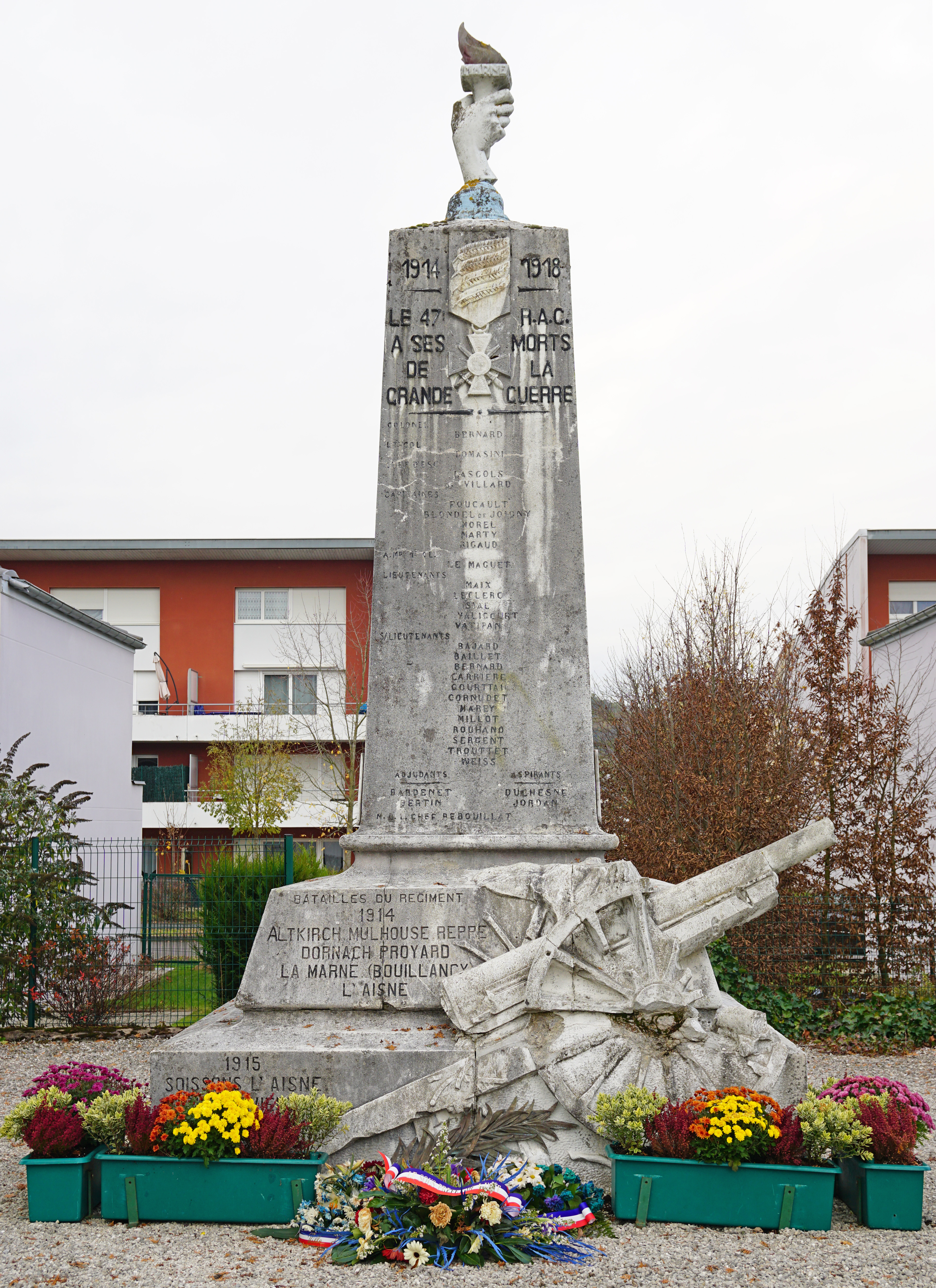 Le monument aux morts du 47e régiment d'artillerie à Héricourt en Haute-Saône.